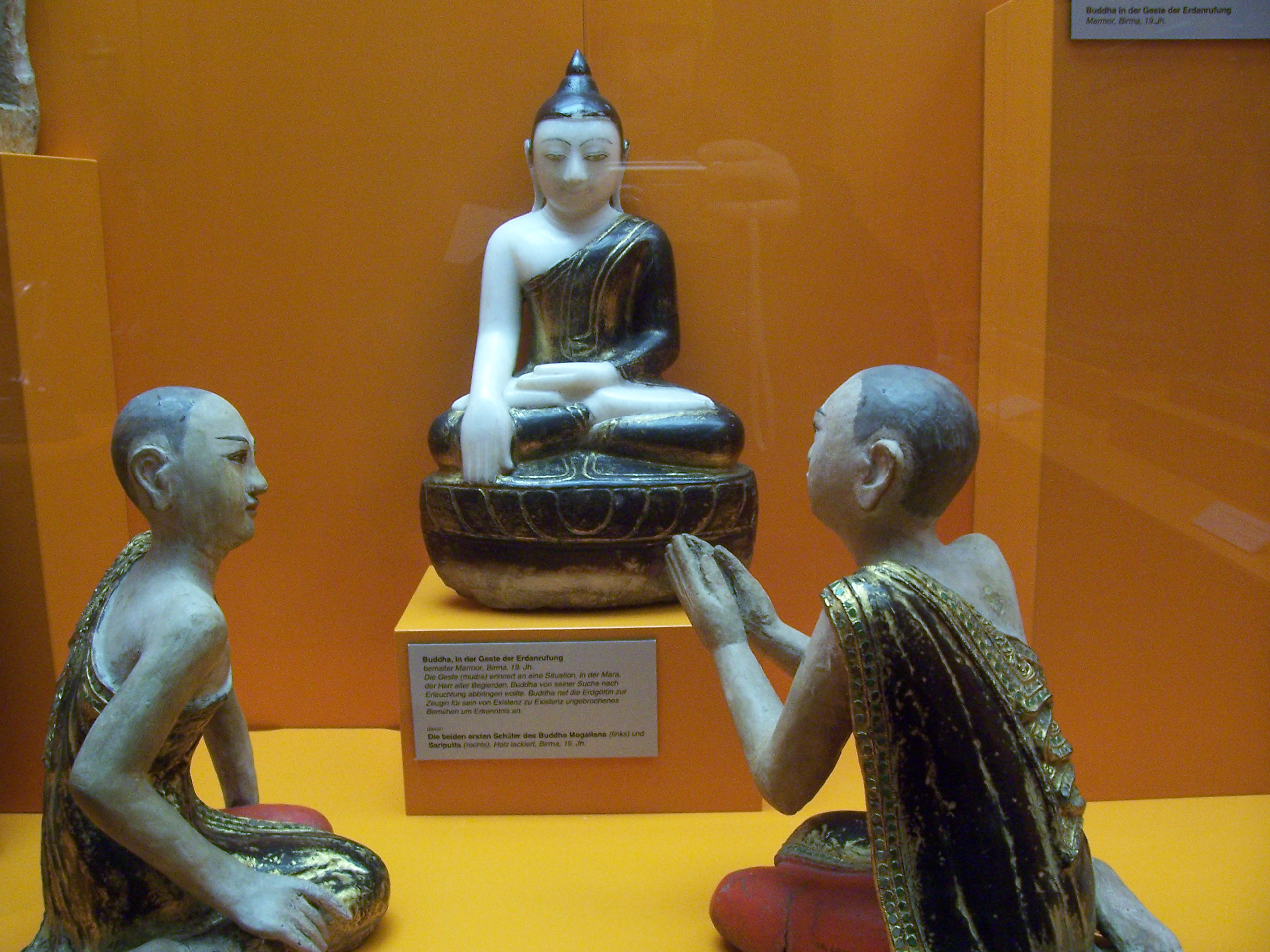 Buddha, in der Geste der Erdanrufung bemalter Marmor, Birma 19 Jh. Die Geste (mudra) erinnert an eine Situation, in der Mara, der Herr aller Begierden, Buddha von seiner Suche nach Erleuchtung abbringen wollte. Buddha rief die Erdgöttin zur Zeugin für sein von Existenz zu Existenz ungebrochenes Bemühen um Erkenntnis an. Die beiden ersten Schüler des Buddha Mogallana(links) und Sariputta (rechts), Holz lackiert, Birma 19. Jh. Beschreibung wie auf dem Foto zu lesen ist